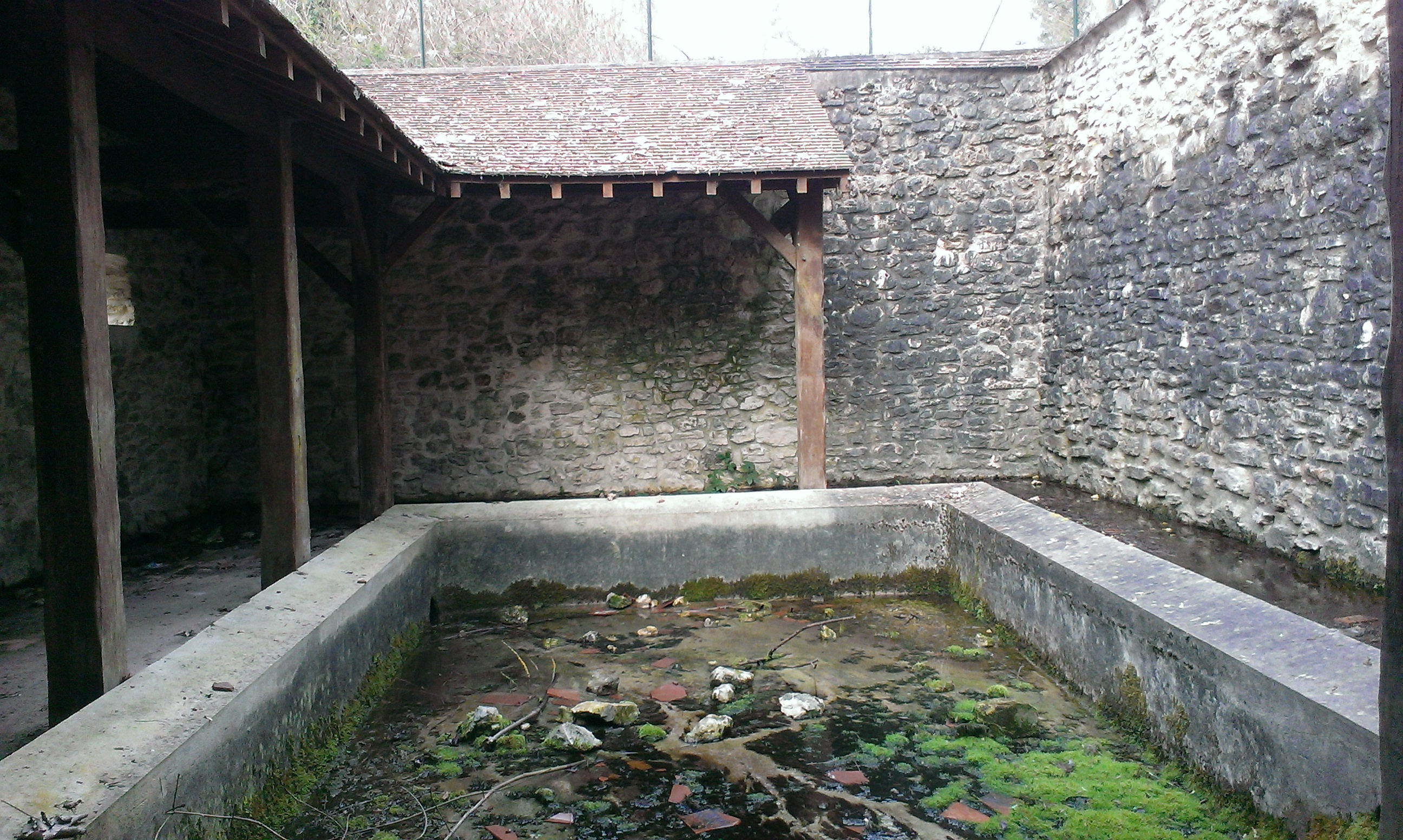 Villiers sur Morin, Lavoir de Retz